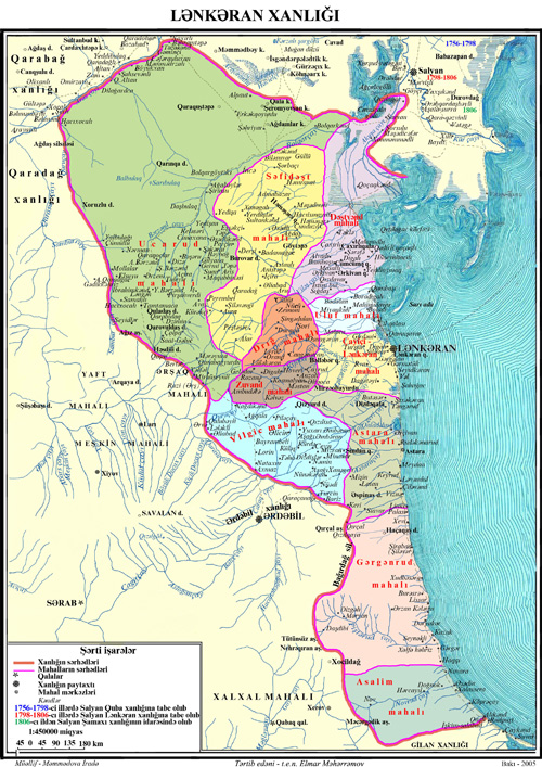 Talış xanlığının xəritəsi